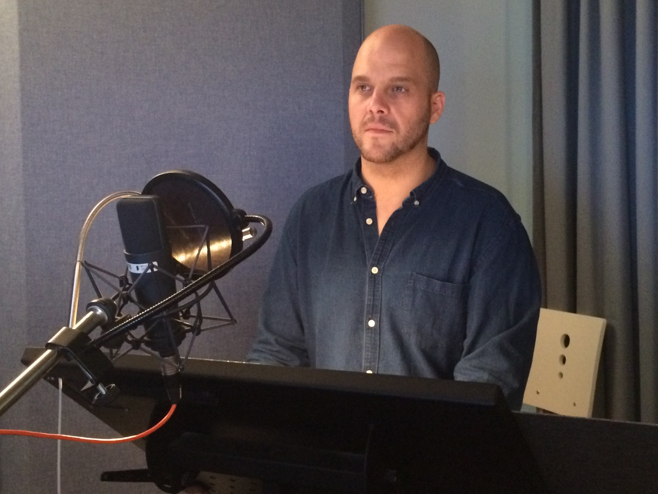 Synchronsprecher Tobias Müller bei den Aufnahmen von Detektiv Conan – 18. Film: Der Scharfschütze aus einer anderen Dimension in Berlin.